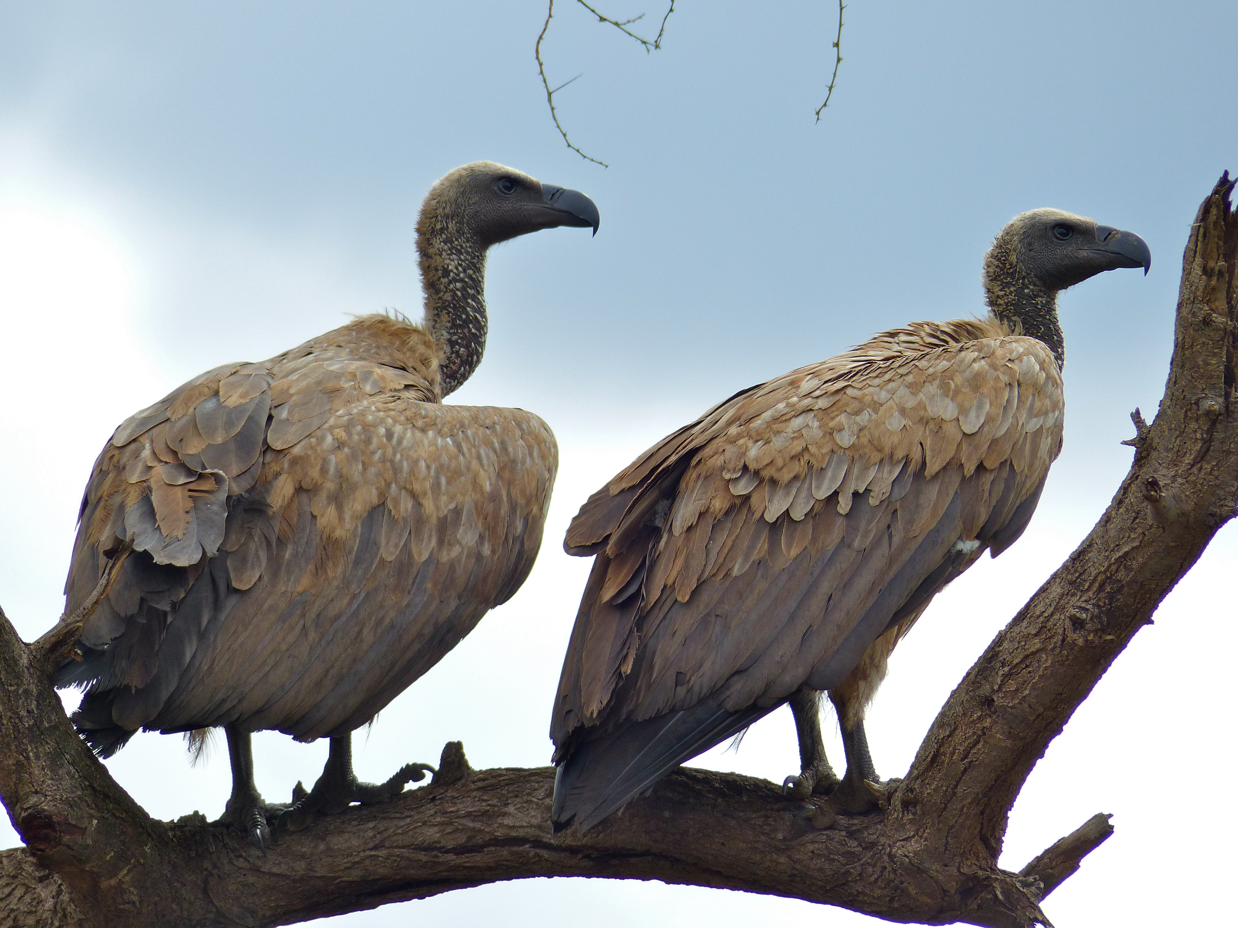 S63 Road, Pafuri area, Kruger NP, SOUTH AFRICA